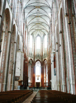 Hauptschiff der Lübecker Marienkirche